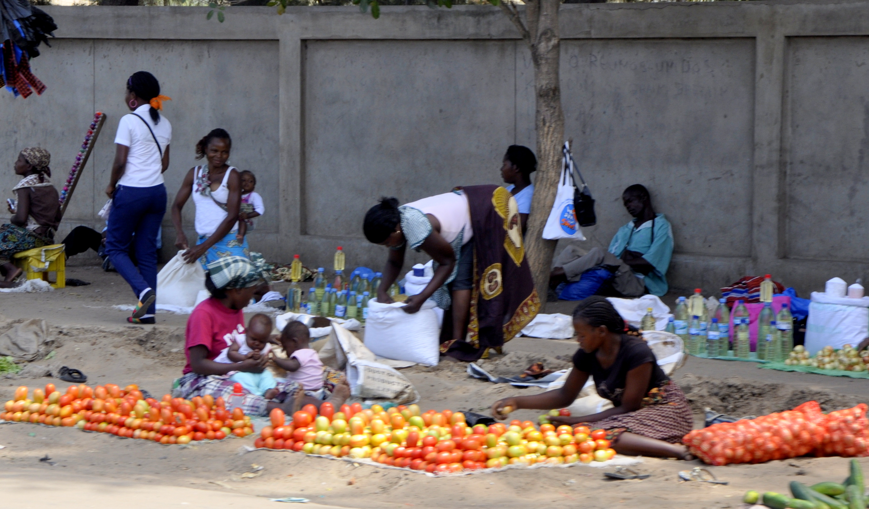 Marche Ambulant dans la ville de Maputo